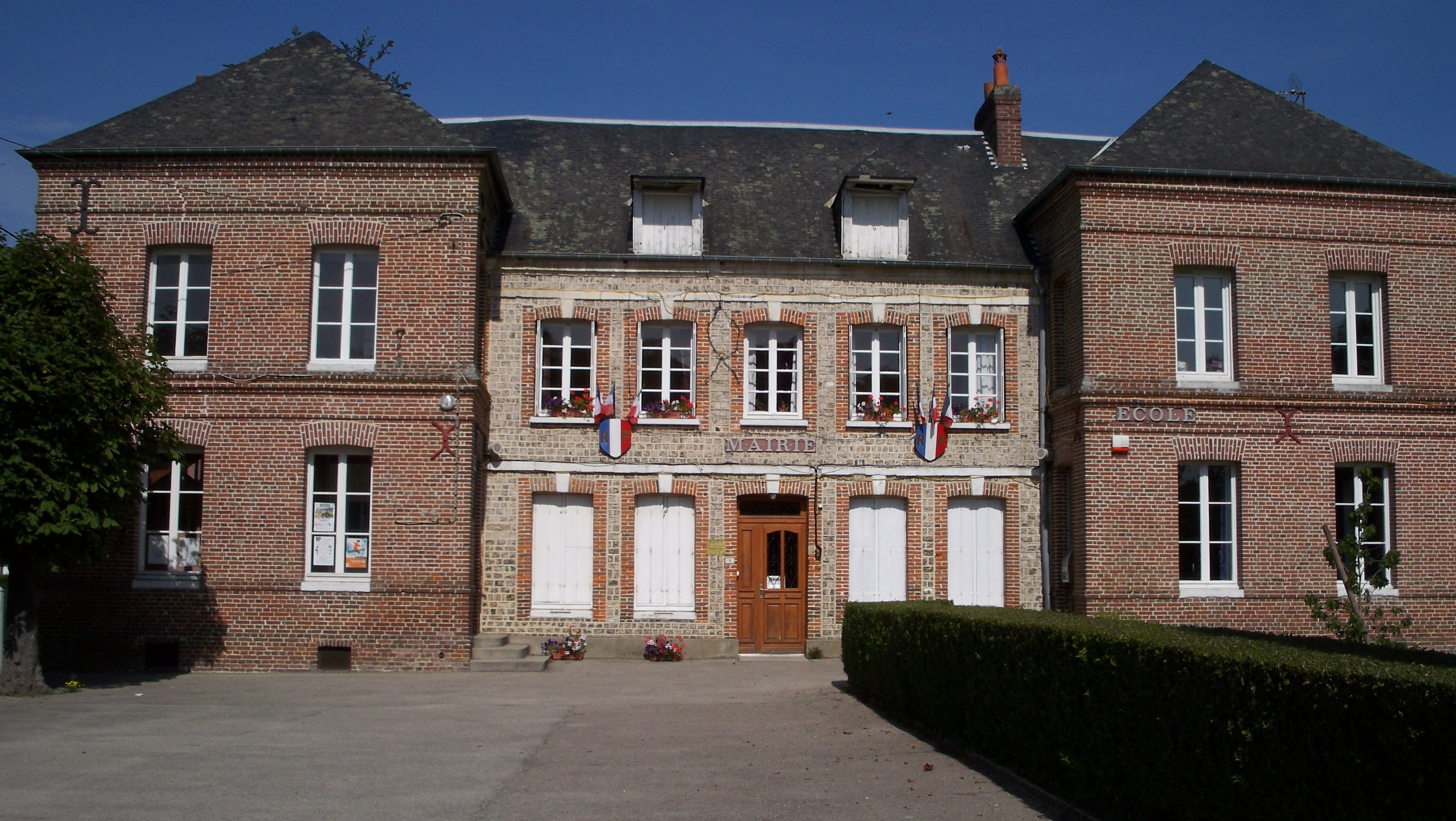 Mairie de la commune de Theuville-aux-Maillots